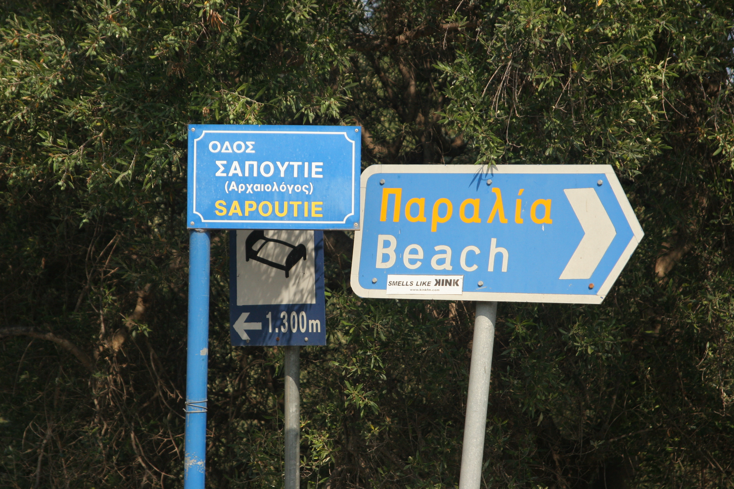 Малия и окрестности. Крит, 2011 Around Malia, Crete, 2011